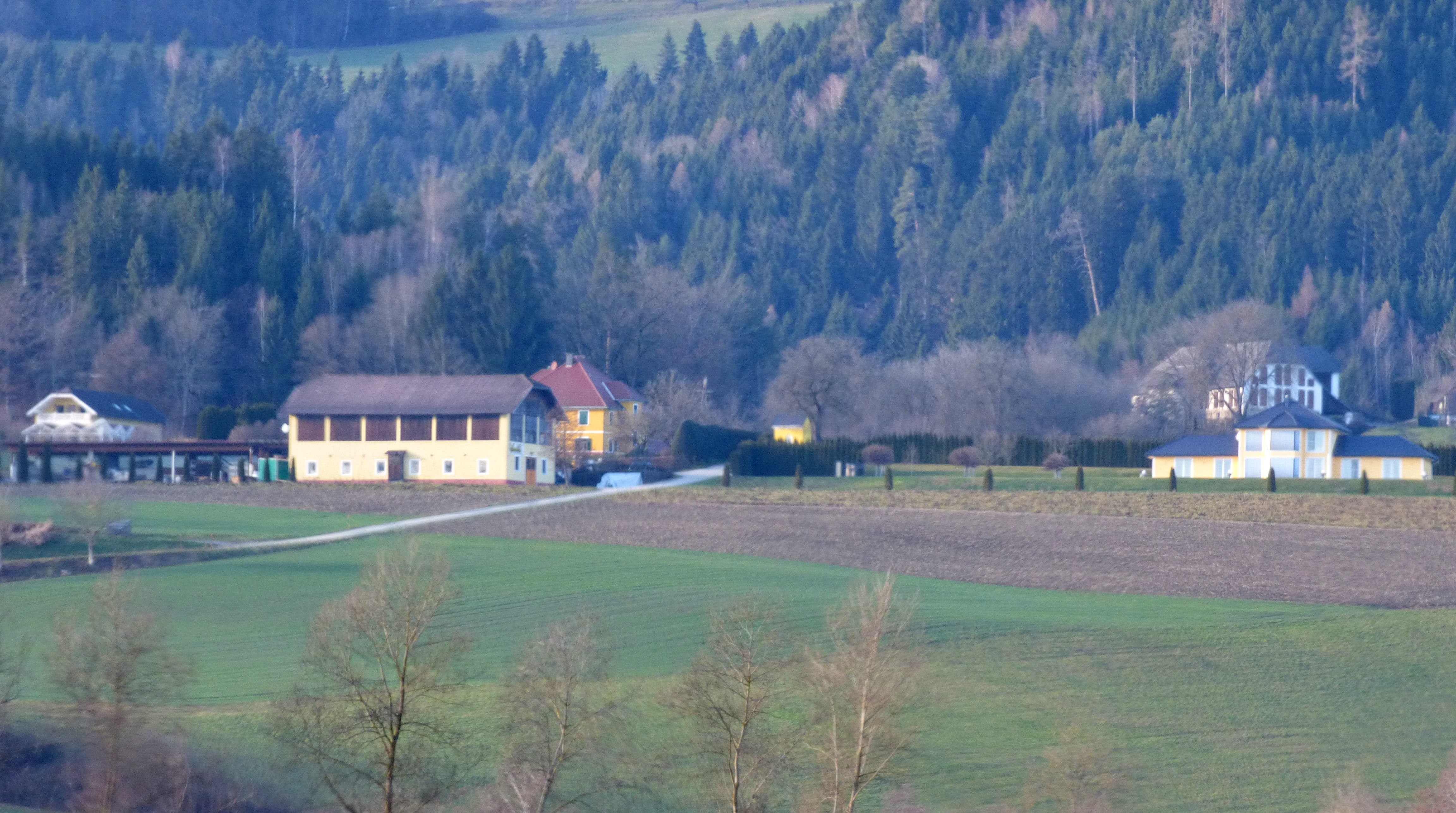 Ort Mailsberg in Kärnten. links Gemeinde Liebenfels, rechts Gemeinde Frauenhofen.